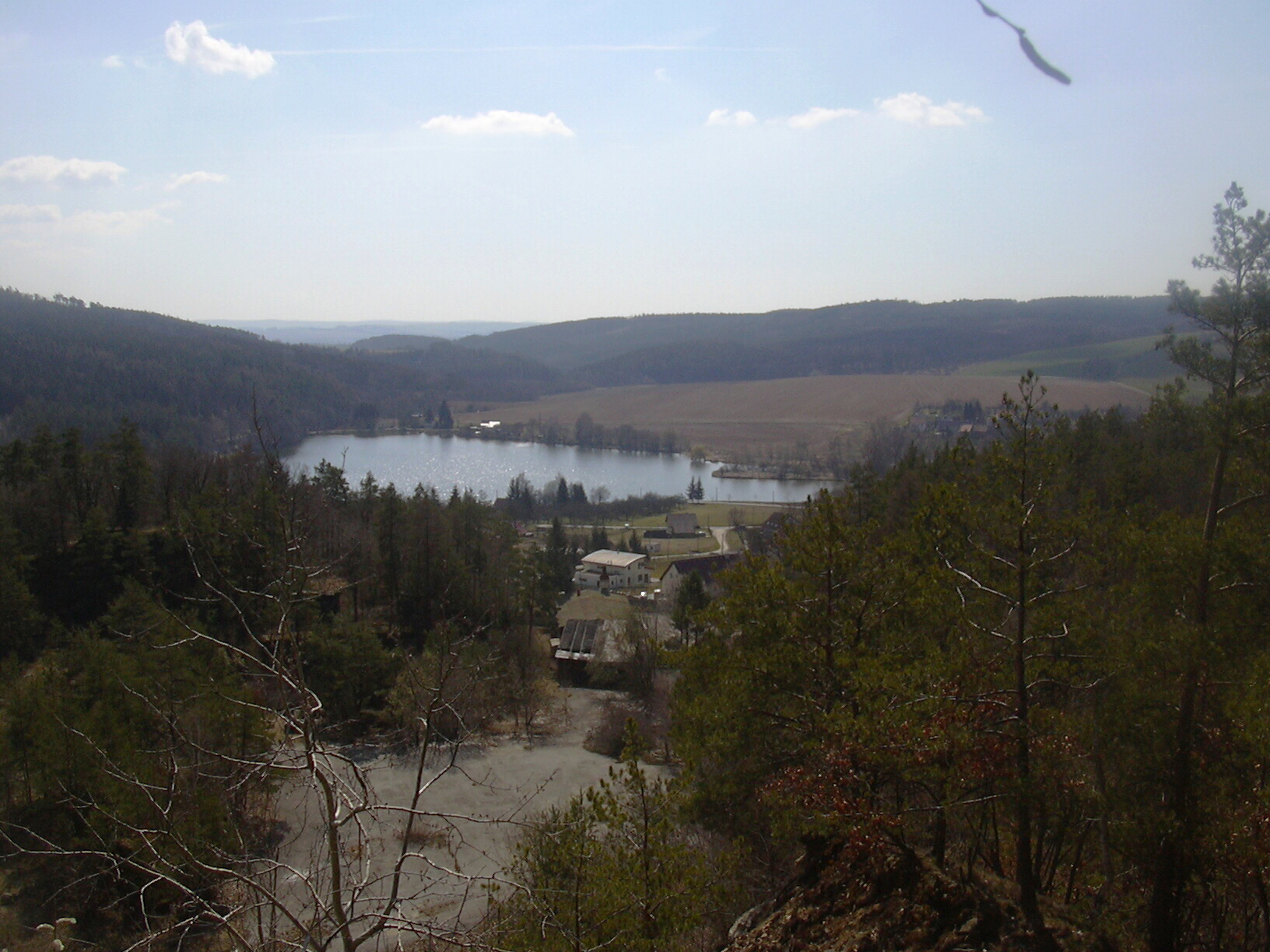 Pístovická riviéra (Vyškov District, Czech Republic)